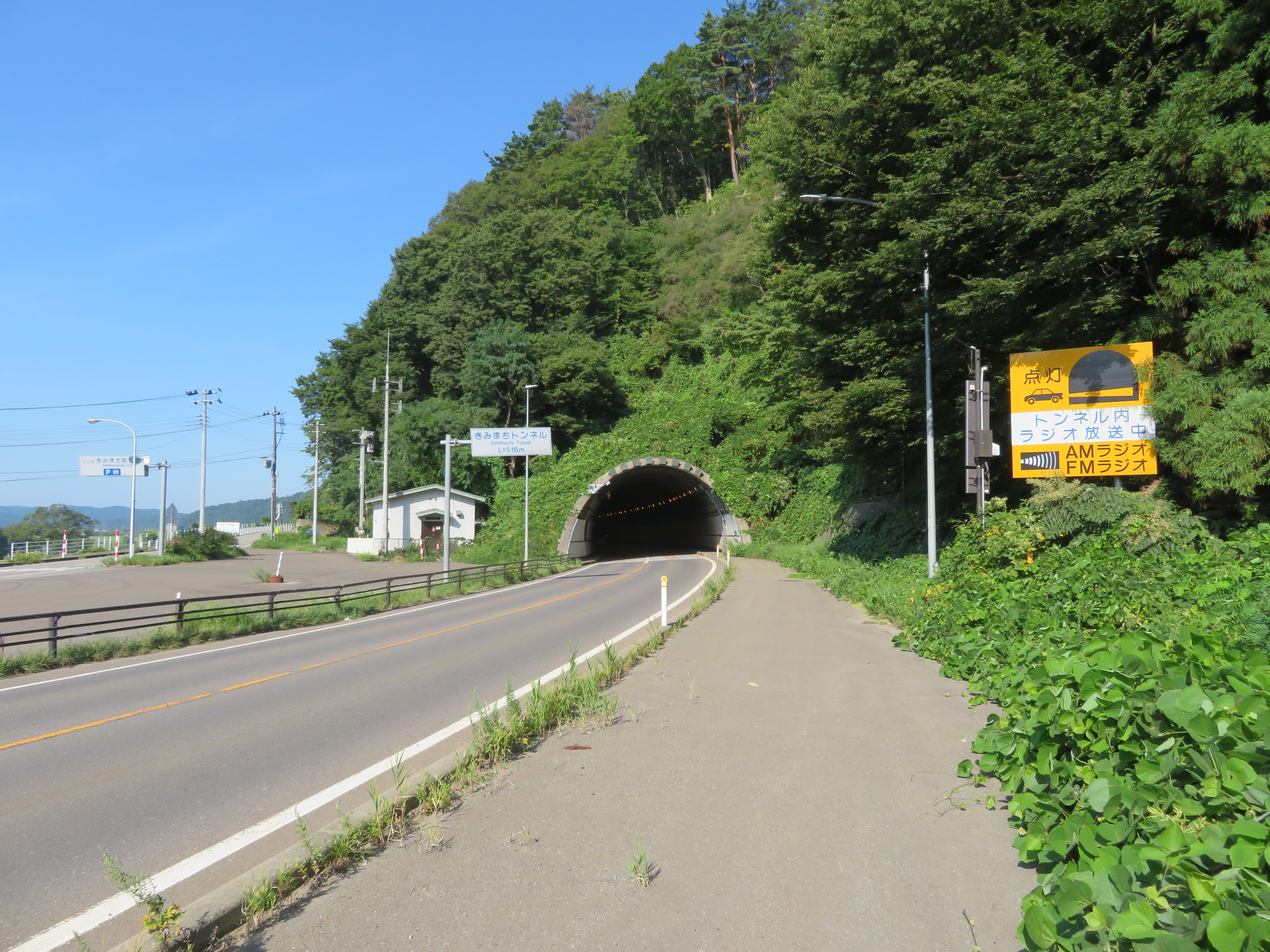 国道7号二ツ井バイパス 秋田県能代市二ツ井町きみまちトンネル（大館市方面側坑口付近を撮影）